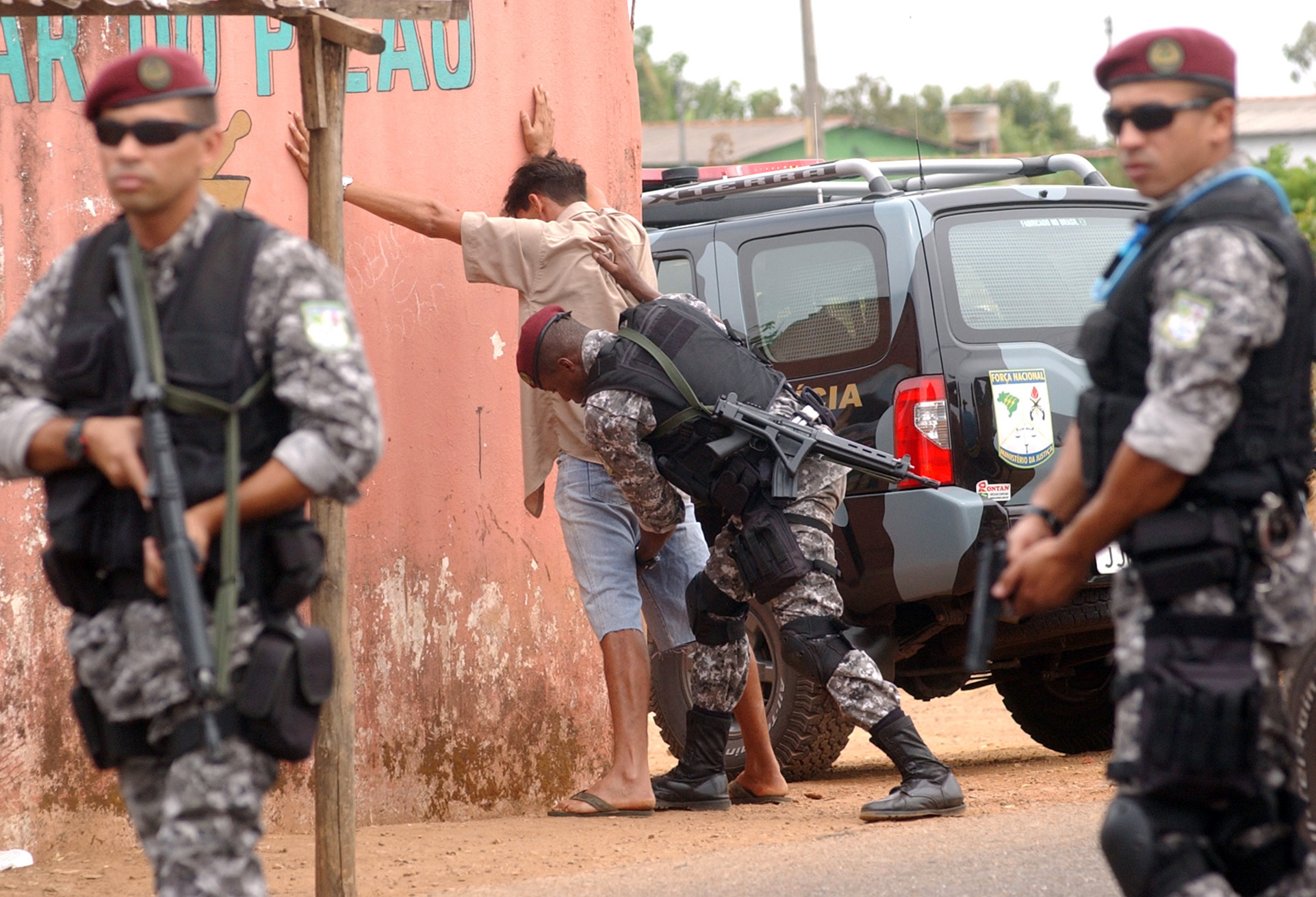 Luziânia (GO) - Agentes da Força Nacional de Segurança atuam no Entorno do Distrito Federal, onde chegaram na sexta-feira (19.10.2007) para uma operação de seis meses